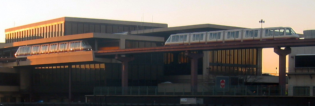 Aeropuerto Internacional Libertad de Newark The AirTrain monorail at Newark Liberty International Airport. In this photograph, one train is about to enter the station at Terminal A, and the other is leaving Terminal A. The monorail connects the Newark Liberty International Airport train station with all terminals (Terminal A, Terminal B, Terminal C) and four on-premises parking lots and garages (P1, P2, P3, P4). Rental car agencies at Newark use lots P2 and P3, and all local hotel shuttles stop outside station P4.